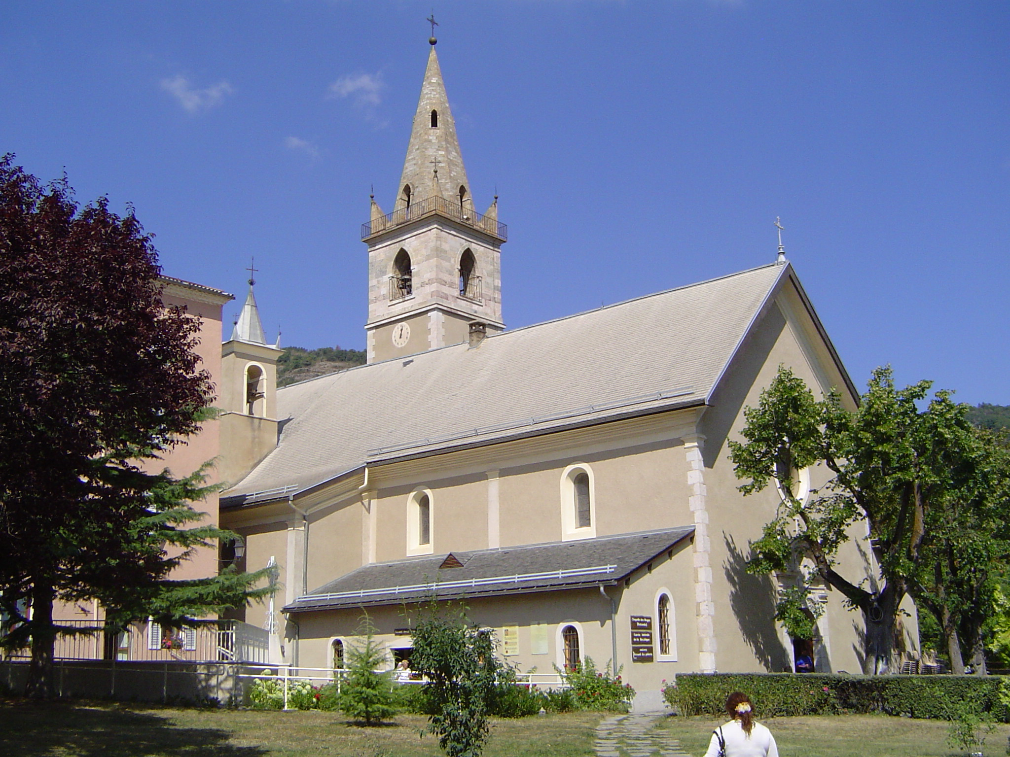 Photo prise à Notre-Dame-du-Laus